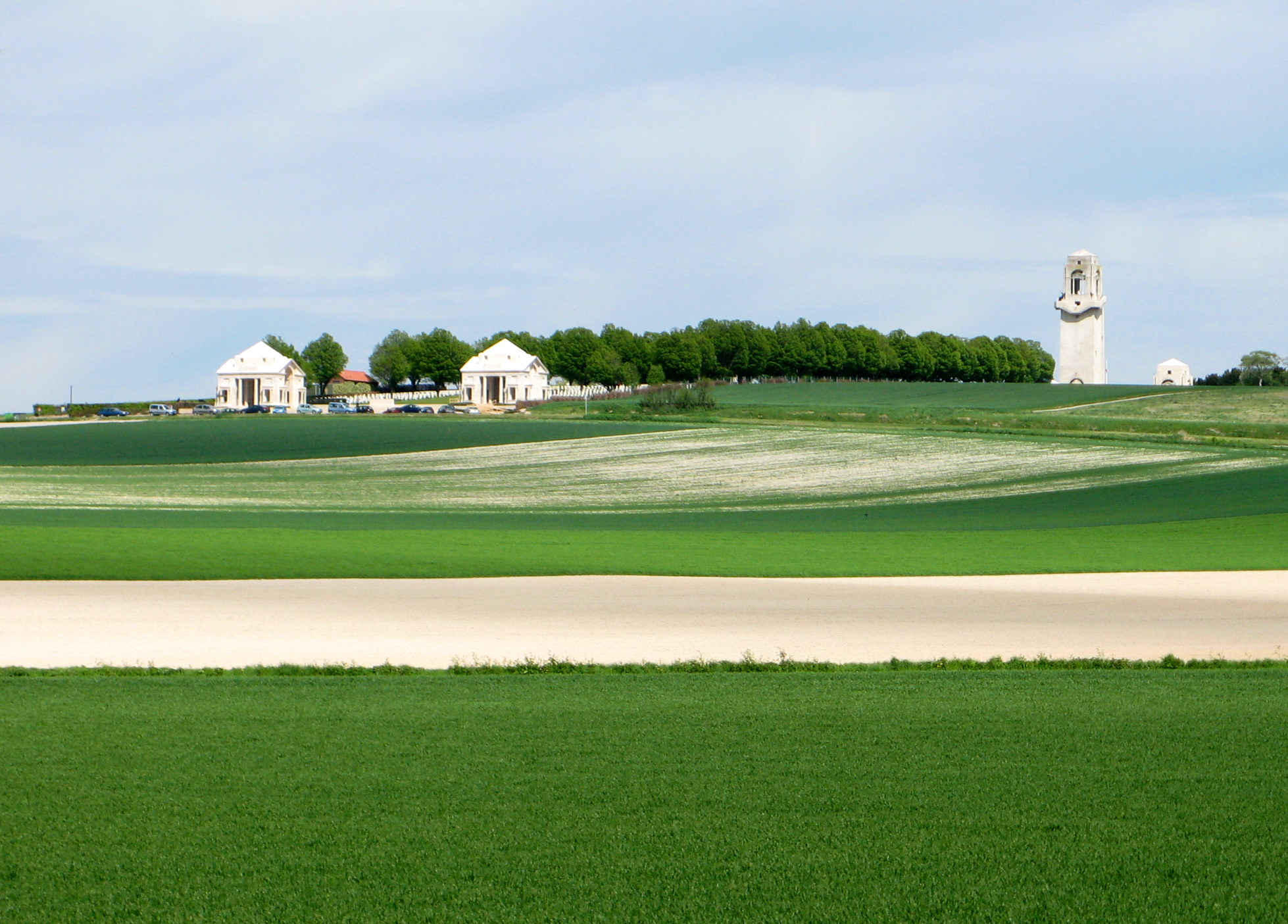 Villers-Bretonneux (Somme, France) - Le cimetière militaire et le Mémorial National Australien (vus depuis la route départementale D 523). . .